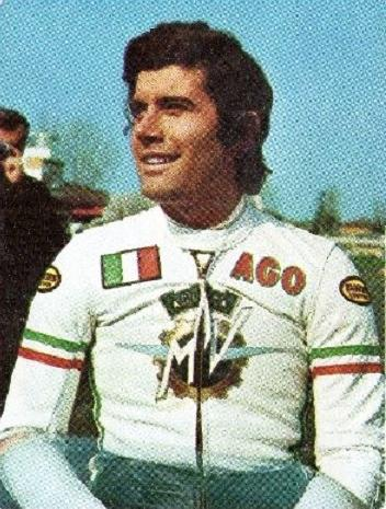 Giacomo Agostini en 1971 - Campioni dello Sport 1973-1974, n°207